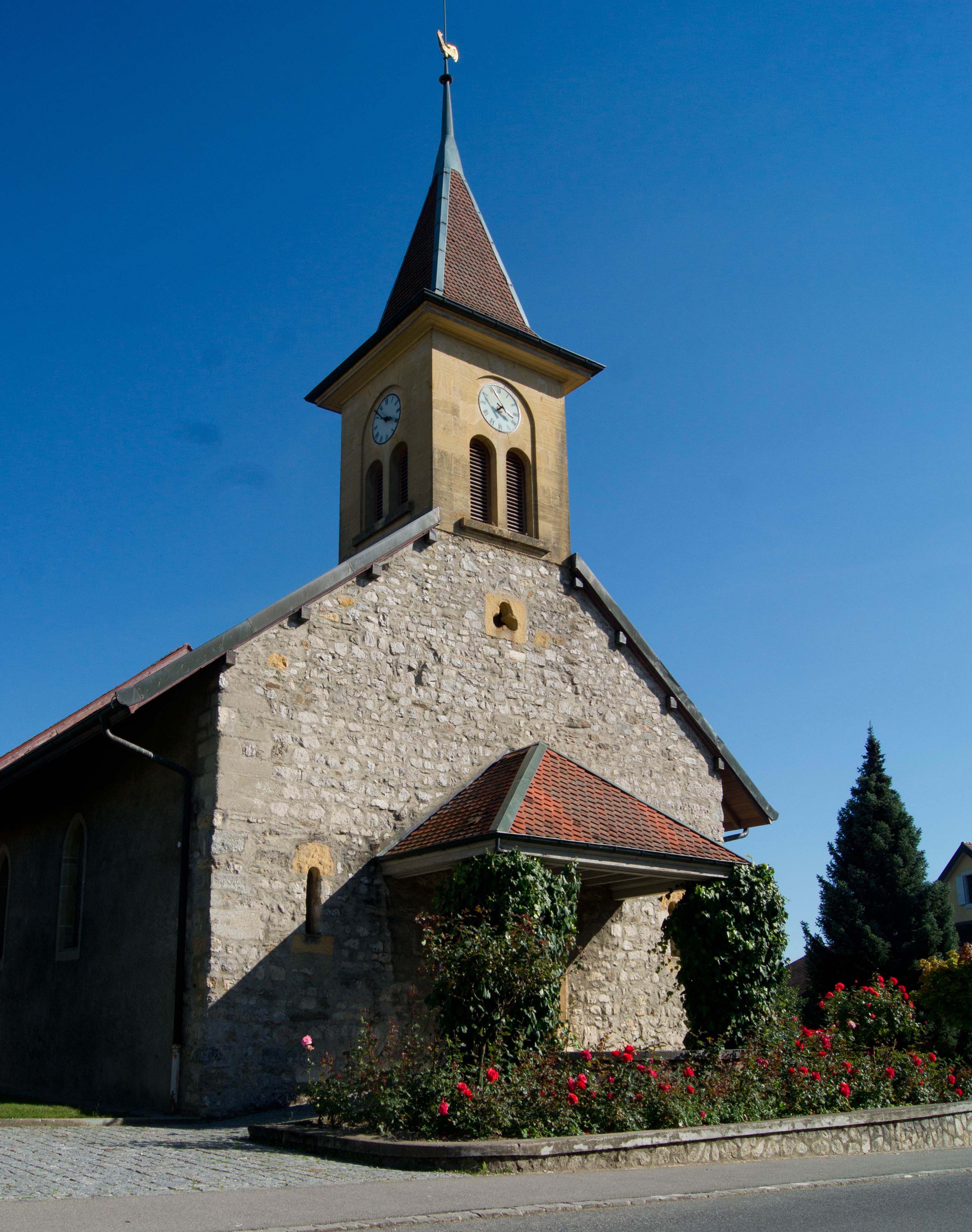 Eglise de Oulens-sous-Échallens, canton de Vaud, Suisse.